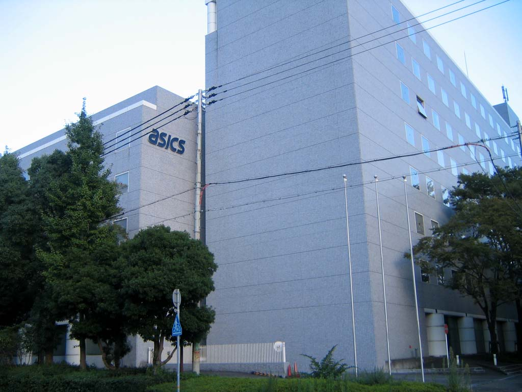 ASICS本社。兵庫県神戸市中央区港島中町七丁目1番1号